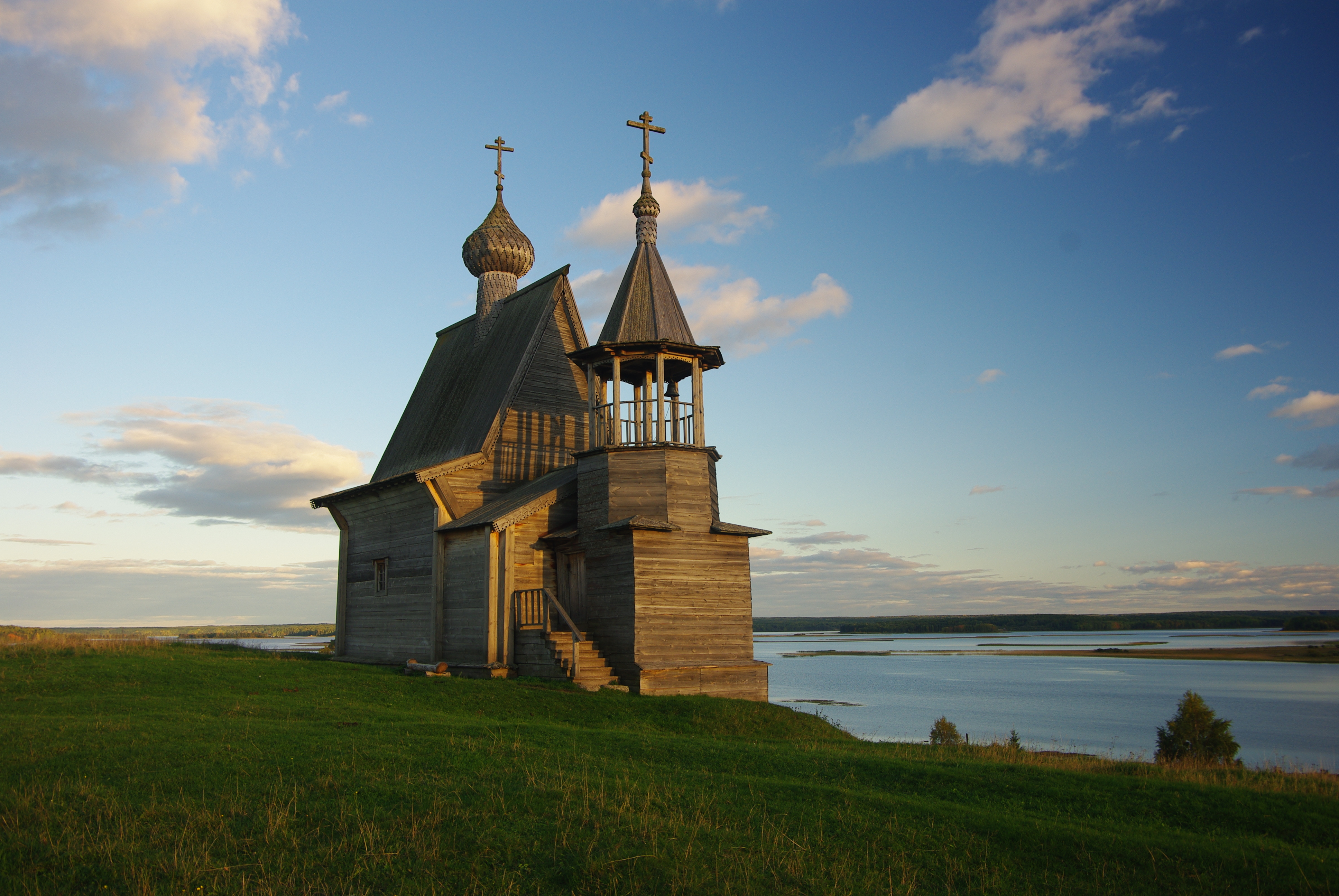 Часовня Николая Чудотворца в Вершинино